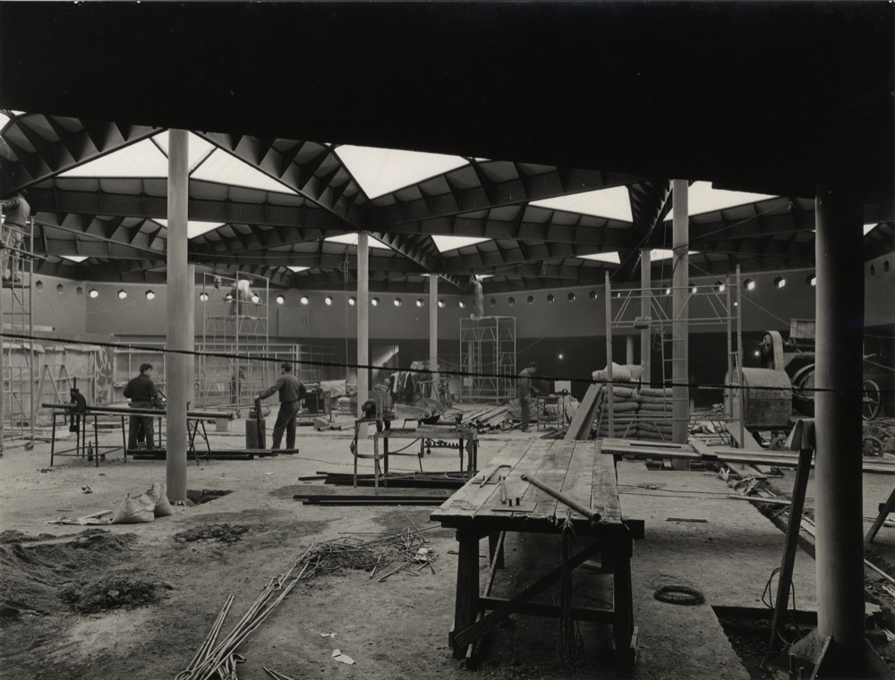 Stazione di Amendola-Fiera della metropolitana di Milano, lavori di costruzione.